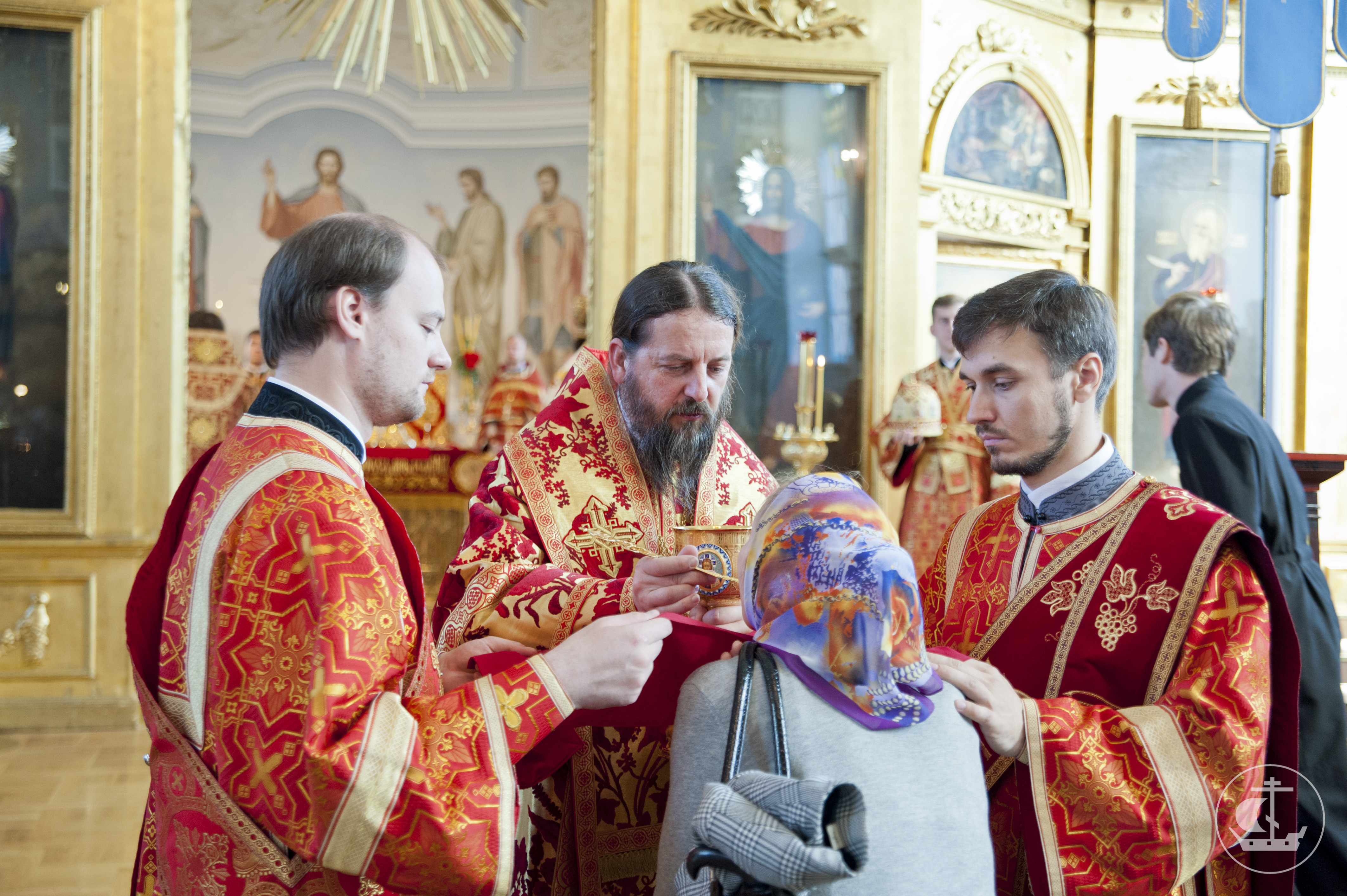 21 мая 2013, Литургия в день памяти апостола и евангелиста Иоанна Богослова